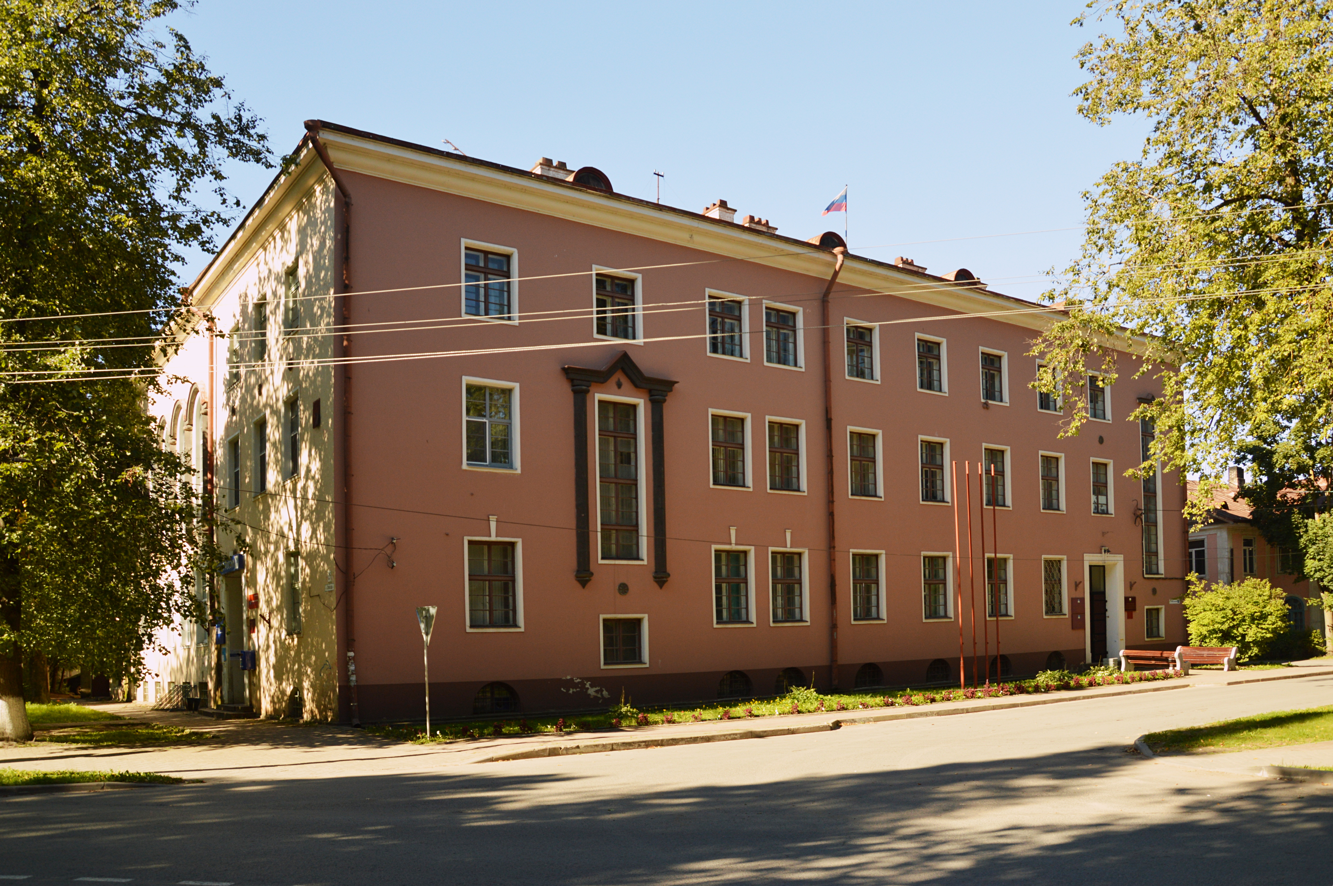 Eesti Panga Petseri osakonna hoone rajati 1929–1930.